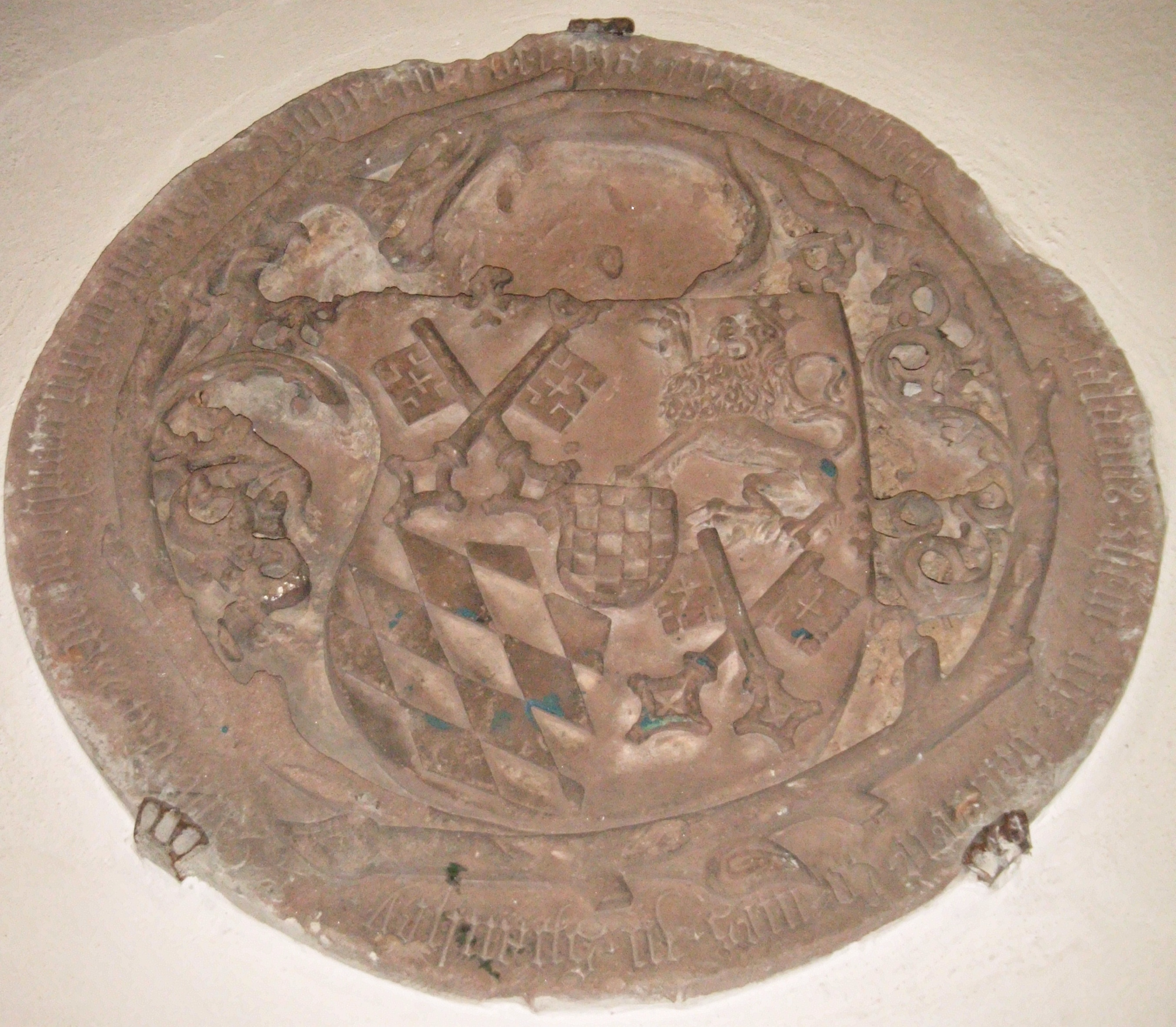 Schlußstein aus dem Wormser Domkreuzgang (heute im Stadtmuseum Worms), gestiftet 1494 von dem Regensburger Bischof Ruprecht von Pfalz-Simmern (1461–1507), mit dessen Bischofswappen